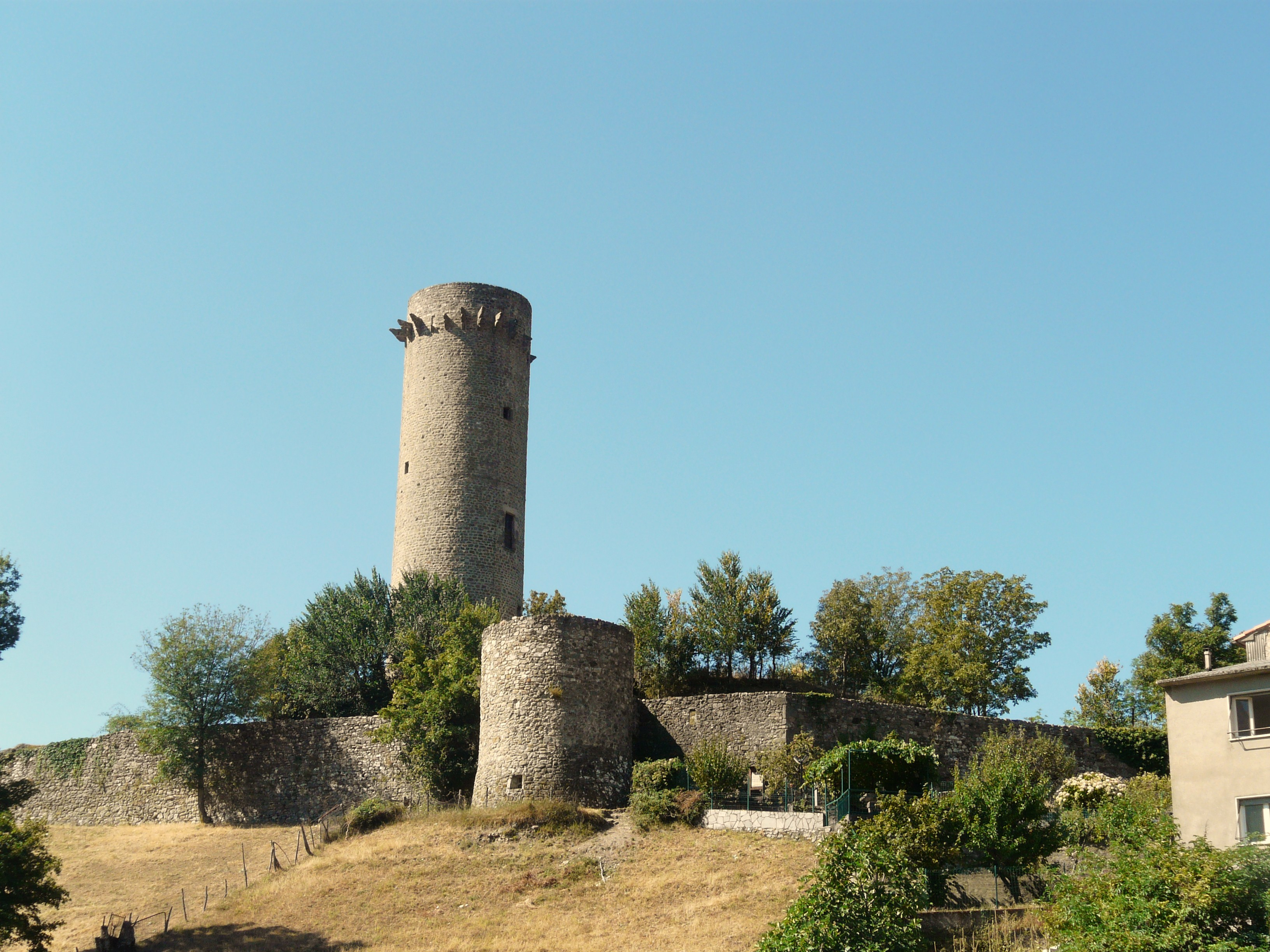 Castello di Comano, Toscana, Italia